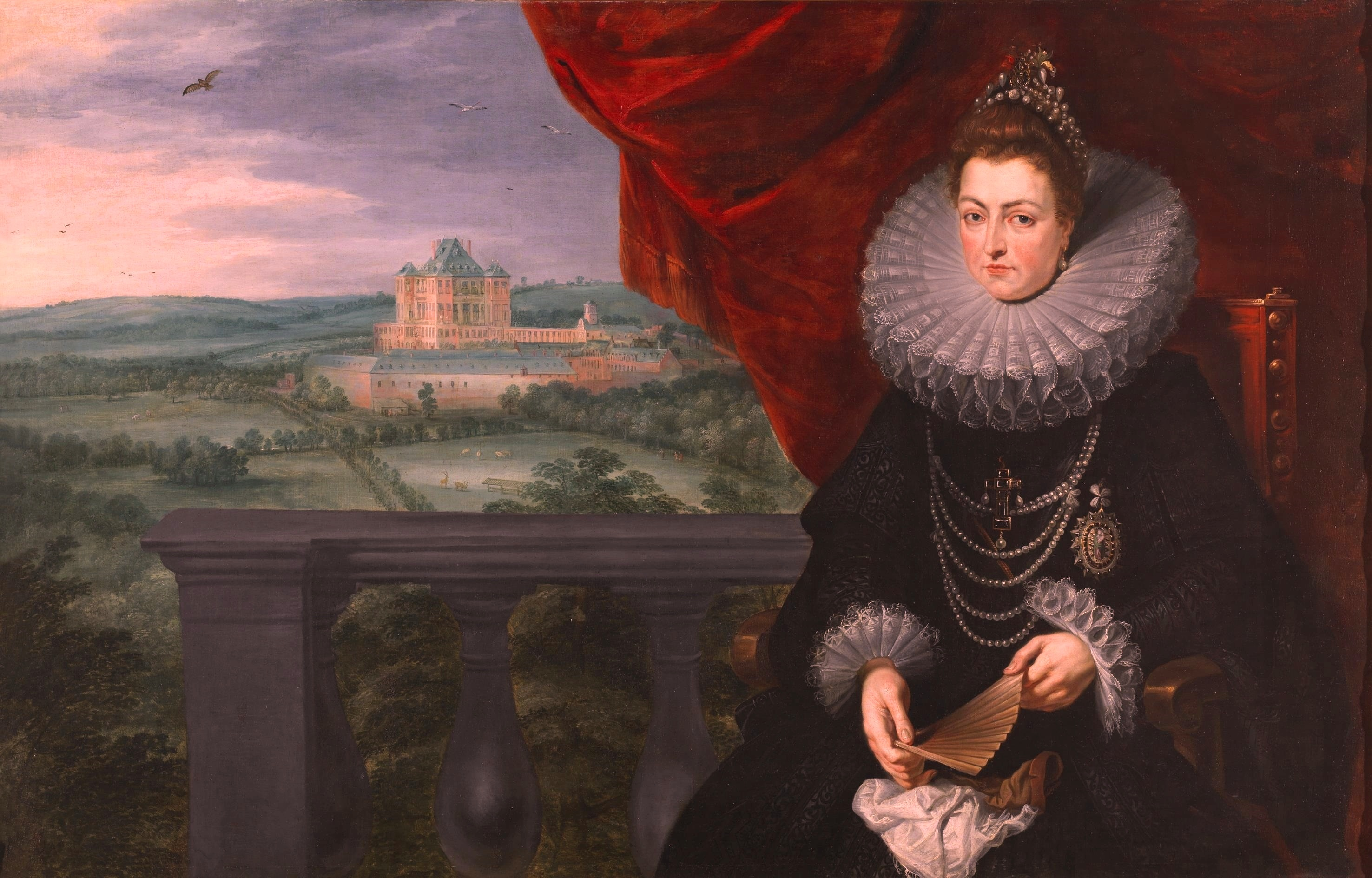 Retrato de la infanta Isabel Clara Eugenia (1566-1633), que fue hija del rey Felipe II de España, esposa del archiduque Alberto de Austria y también soberana y posteriormente gobernadora de los Países Bajos.Isabella Clara Eugenia was the first daughter of King Felipe II. of Spain